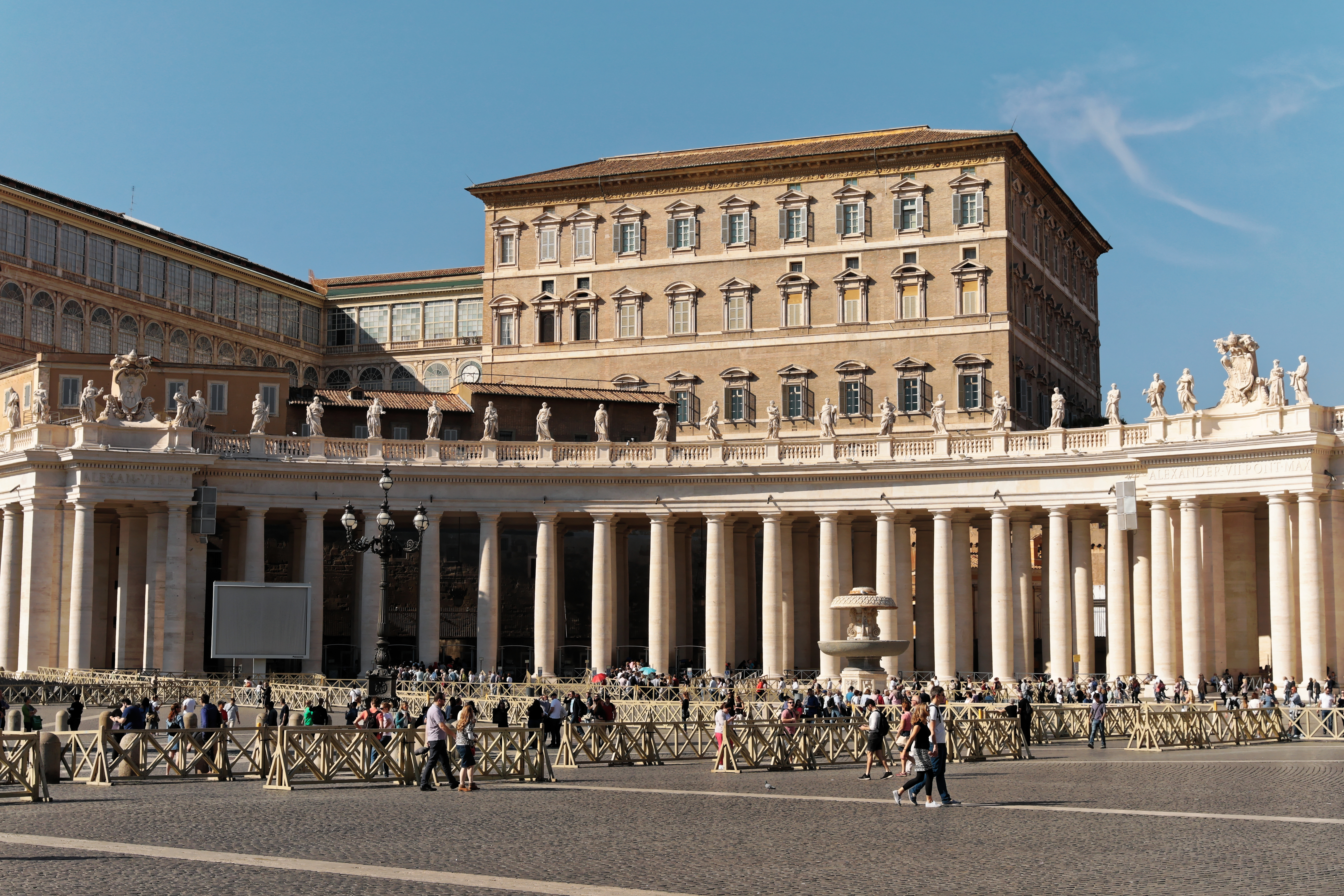 Petersplatz mit Menschen